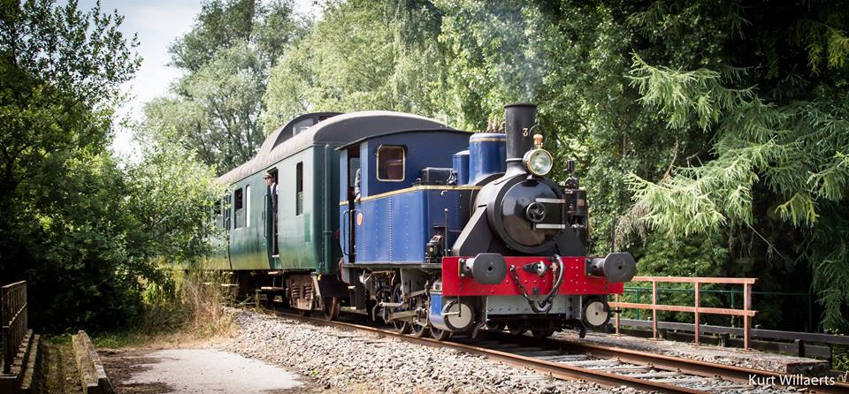 Stoomlocomotief Wase kleiputter aan de Vliet in Puurs.